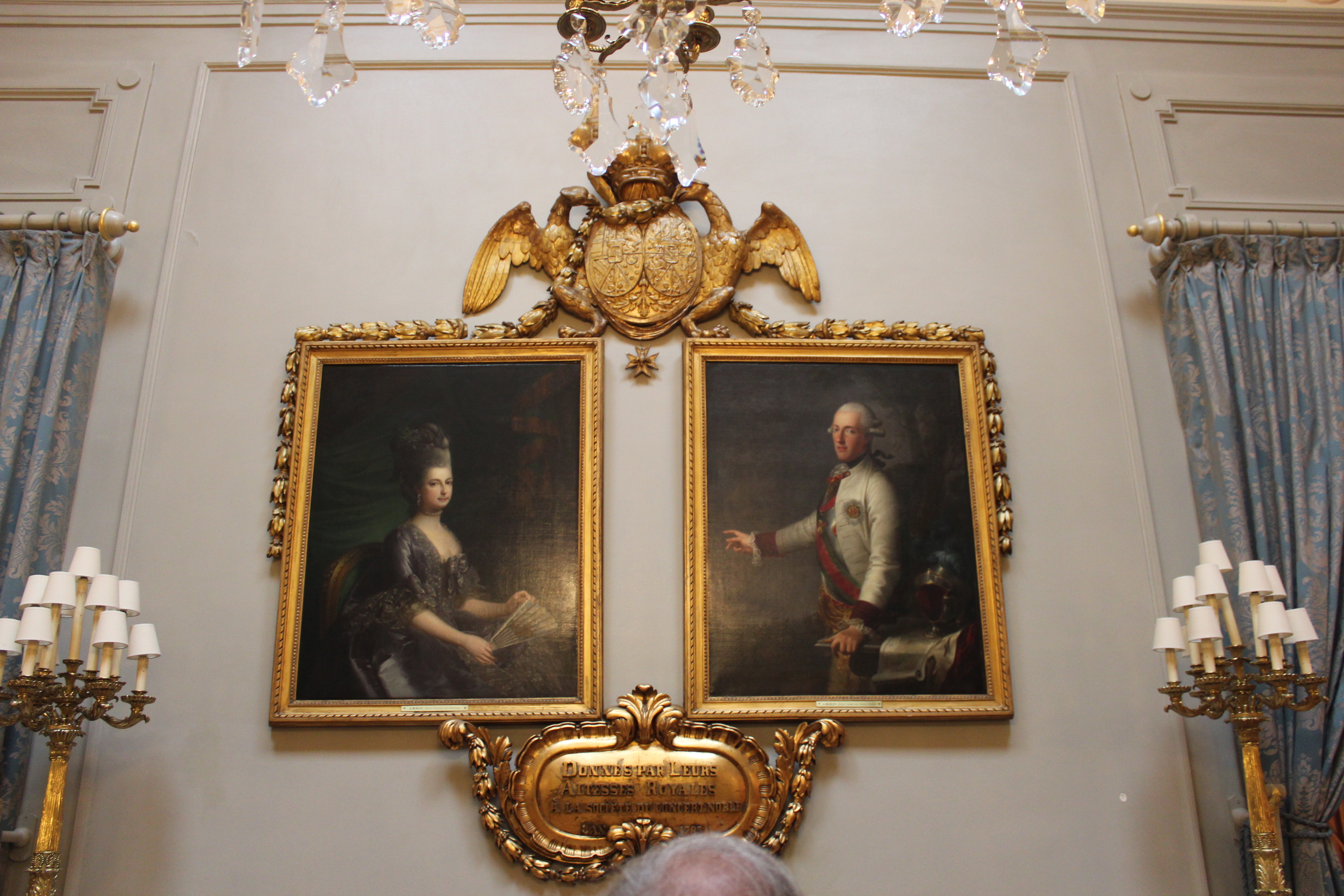 Interieur van het Concert Noble, een neoclassicistisch spektakelzaal, gebouwd 1872-1873 naar plannen van architect Henri Beyaert. Portretten van Albert Kasimir van Sachsen-Teschen en Marie-Chrtistine van Oosterijk, de stichter van de Société des Concerts nobles, in de voorkamer.